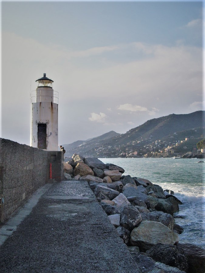 Il faro di Camogli